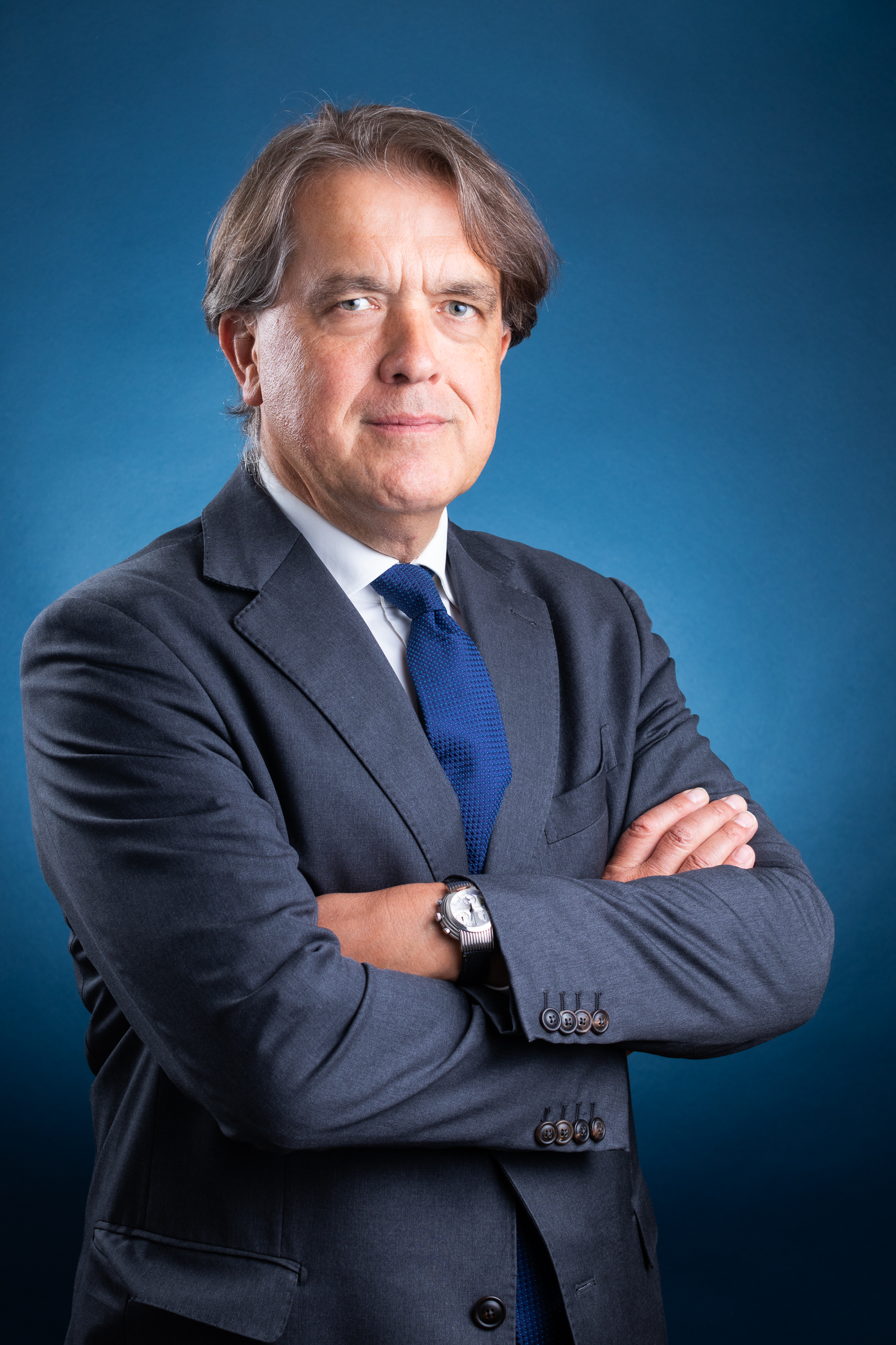 Jean de Lambertye